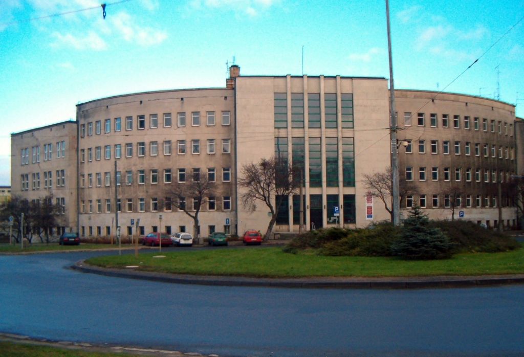 Gdynia, pl. Konstytucji 5 / Wójta Radtkego 44 - sąd rejonowy, obecnie sąd apelacyjny, 1936